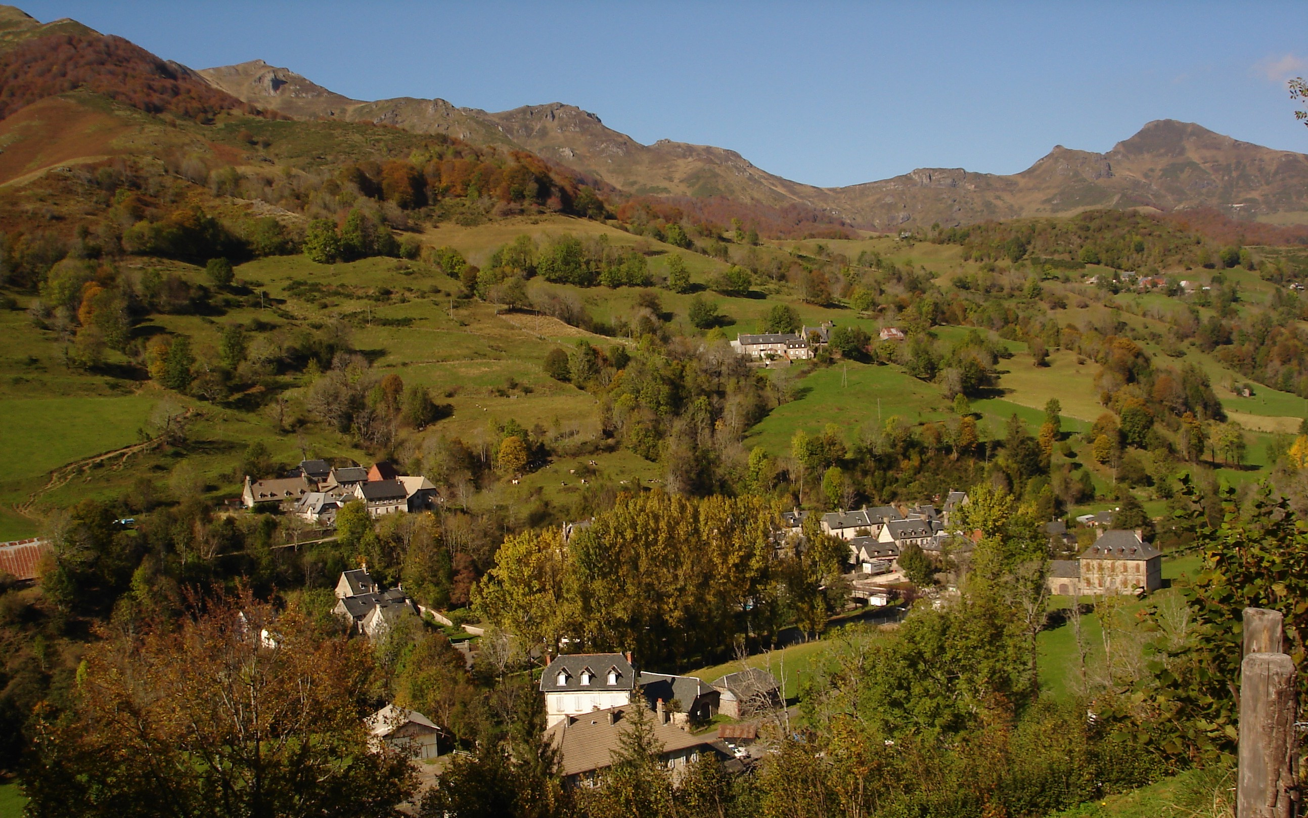 Le Mas, bourg de Mandailles (Cantal), la maison de Cheylus, les écoles, et les villages de : Bardugué, Massoubro et Louradou. Au loin Rudez, mais également le Puy Mary.